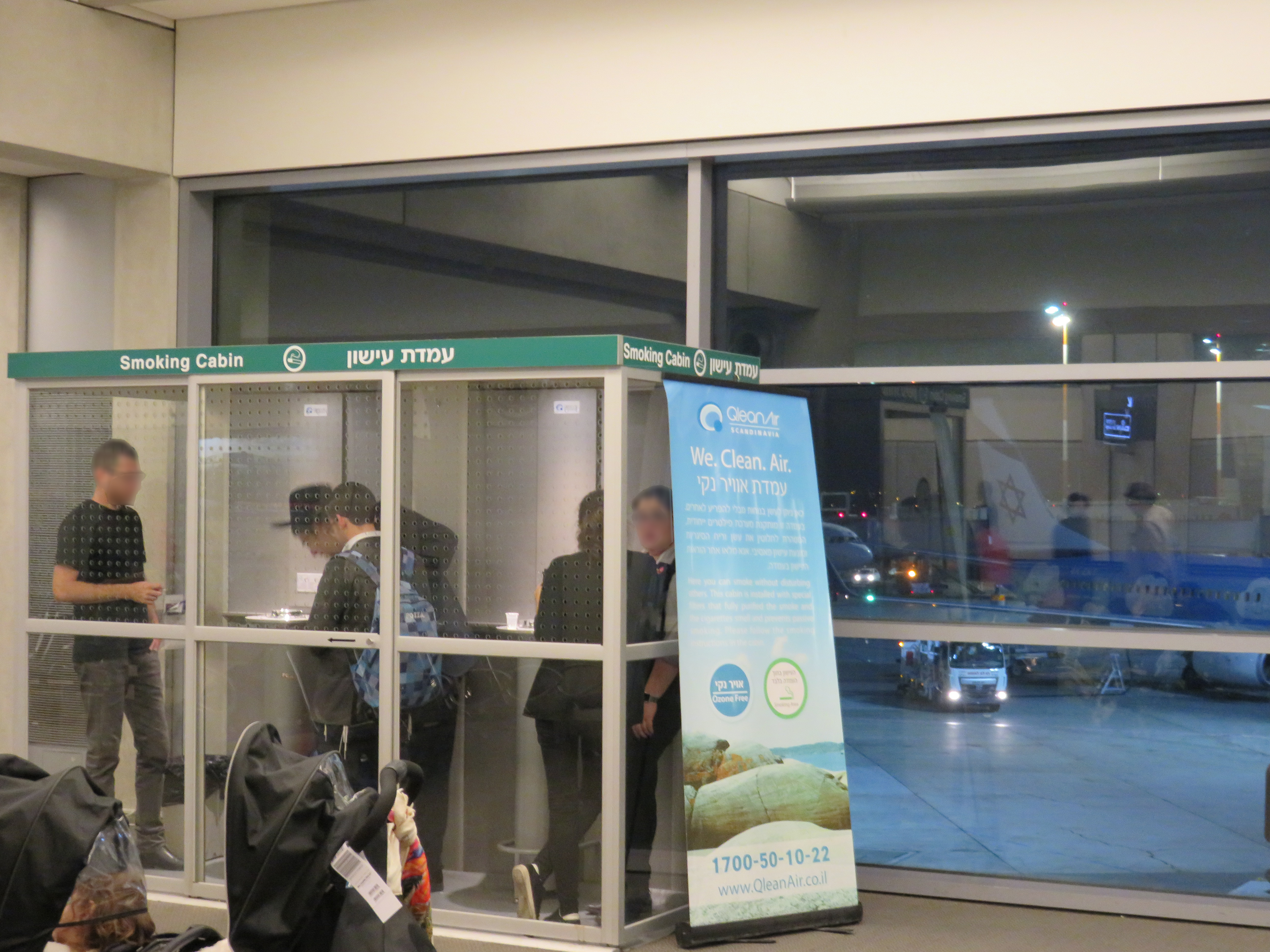 . 2 עמדת עישון בנתב"ג.jpg